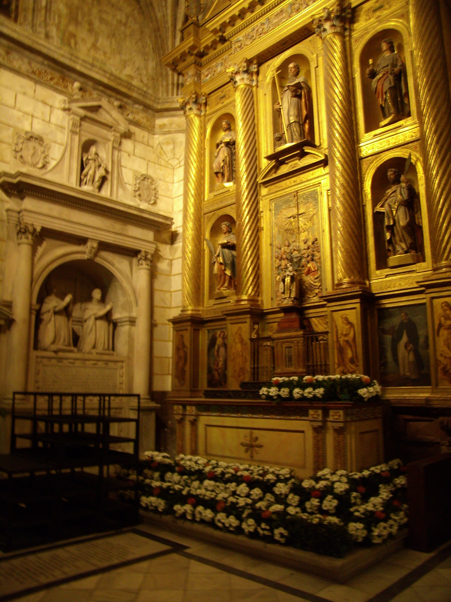 Capilla de San Jerónimo de la Catedral de Palencia.